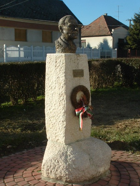 Fekete István mellszobra Göllén. Farkas Pál alkotása (1999)